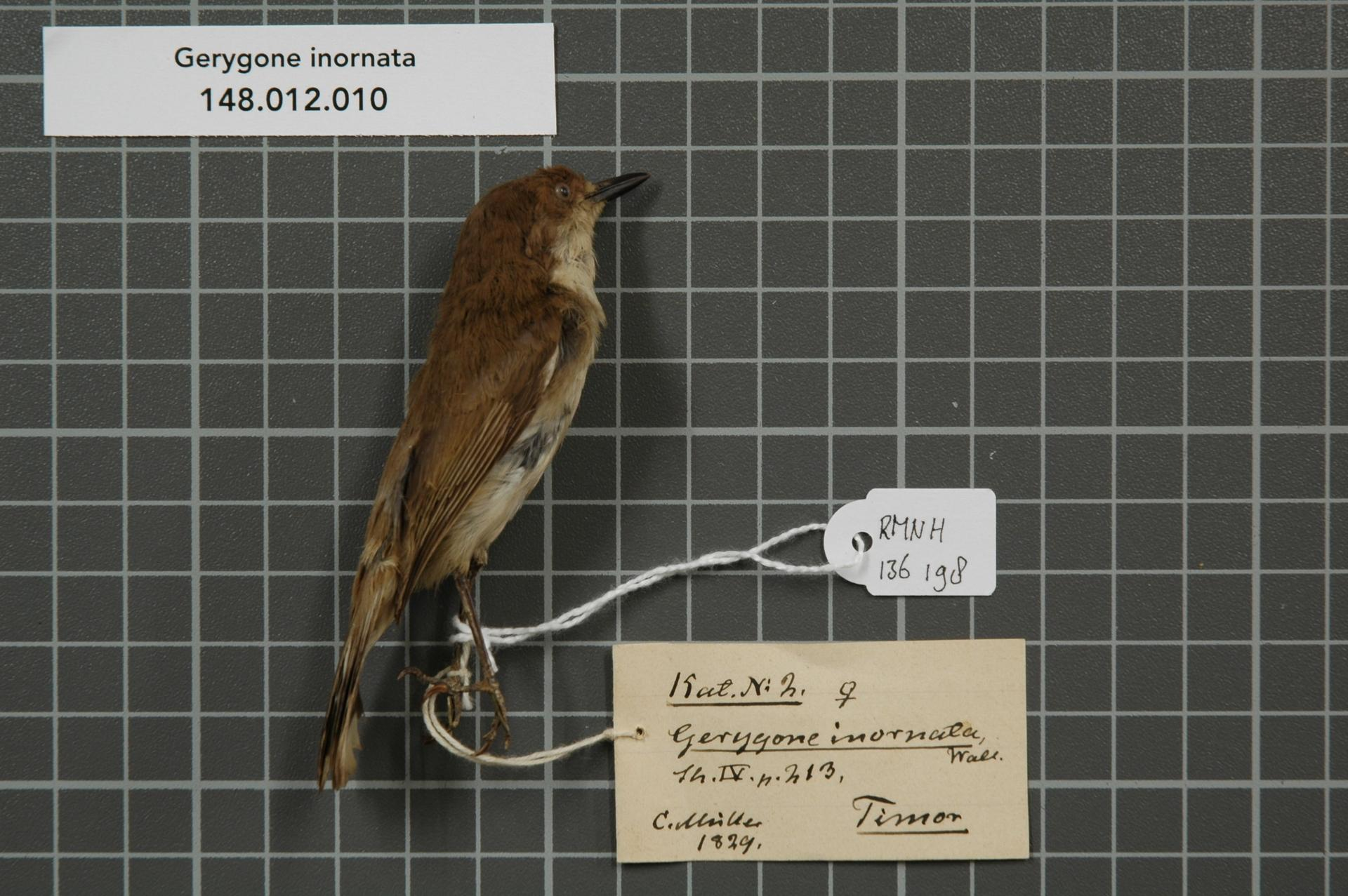 Gerygone inornata Wallace, 1864